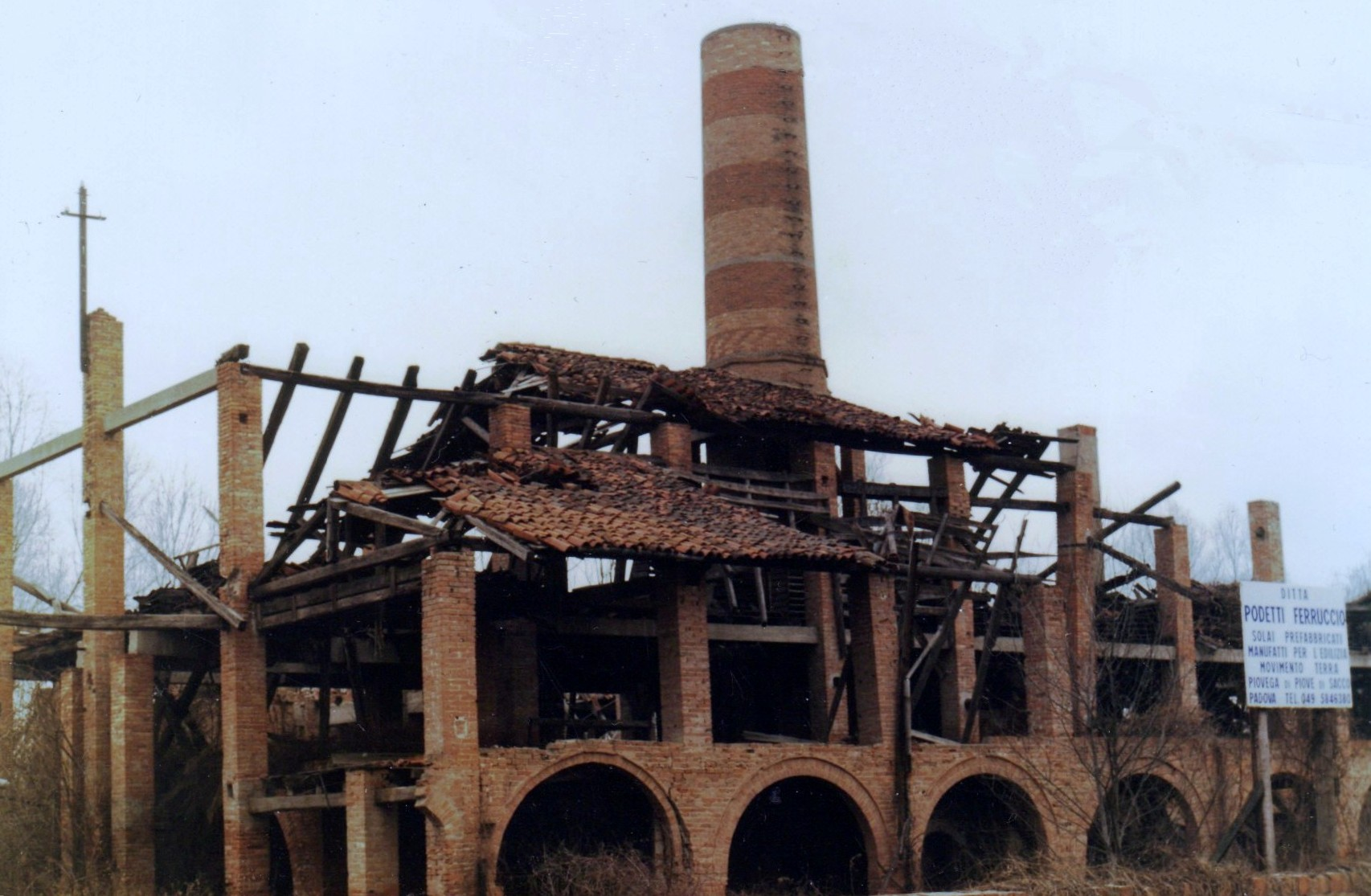 Fornace Morandi a Noventa Padovana.